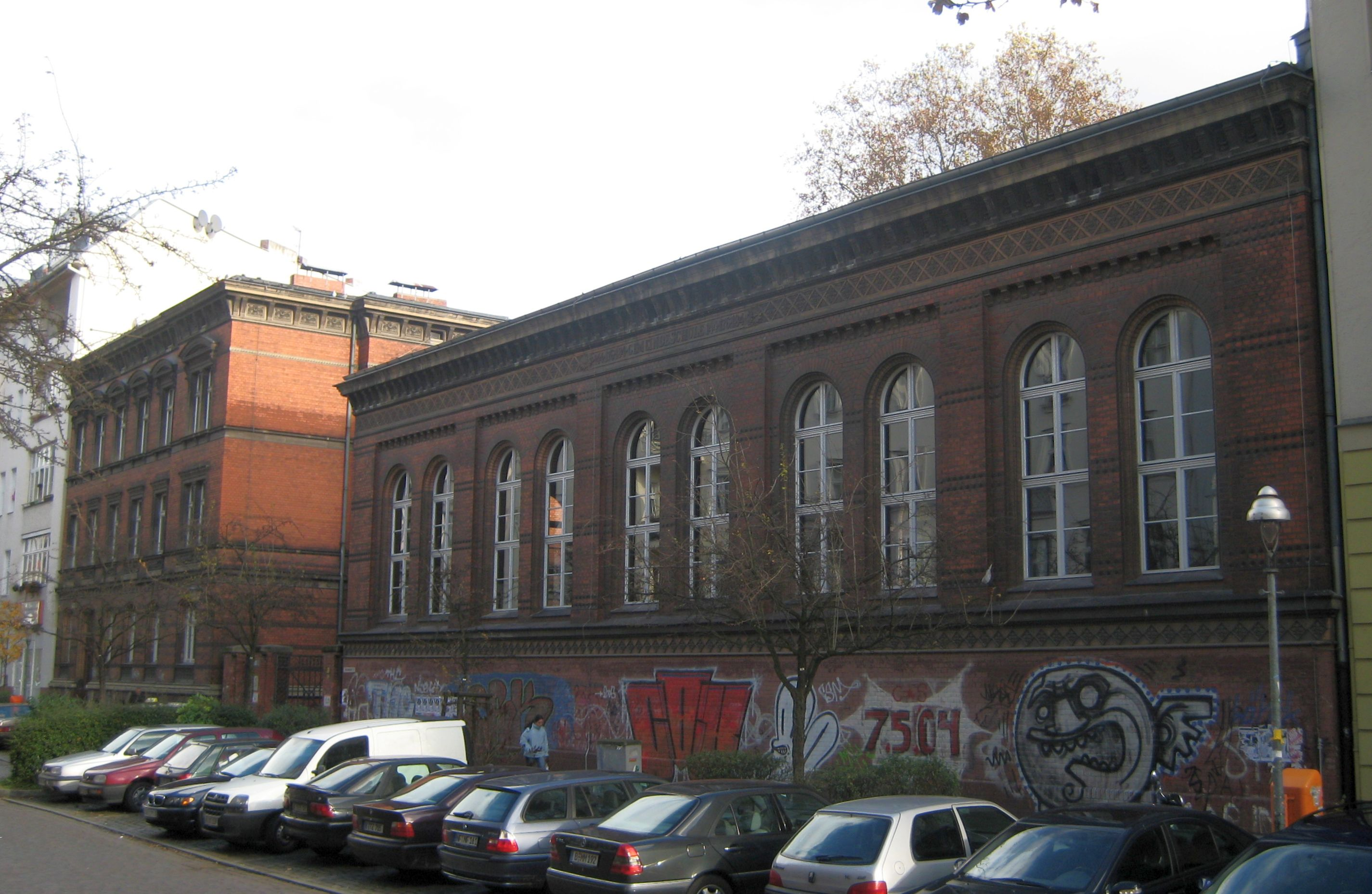 teachers building and gym at the 144., 176. und 184. Gemeindeschule (today Friedrich-Ludwig-Jahn-Oberschule) in Berlin-Kreuzberg, landmarked buildings; built in 1888-1890 by H. Blankenstein and K. Frobenius.